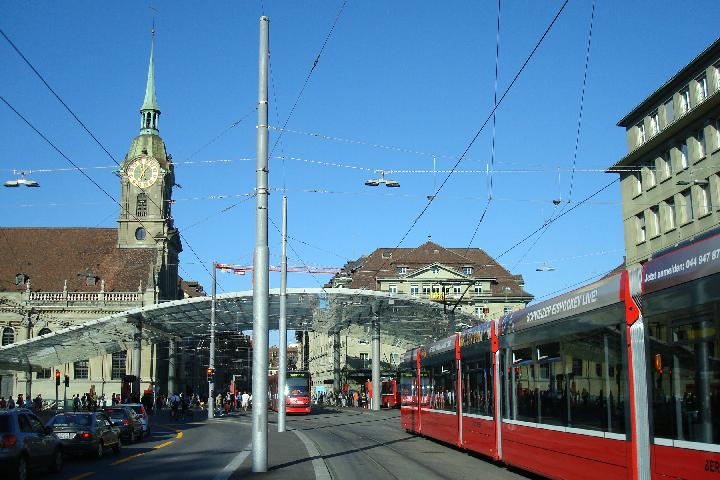 Siemens Combino Gelenktram mit Baldachin des neugestaltenten Berner Bahnhofplatzes und der Heiliggeistkirche im Hintergrund im Juli 2008. Im Gebaude im rechten Hintergrund unter den Lauben is der bestbekannte Treffpunkt in Bern namens Loebecke!